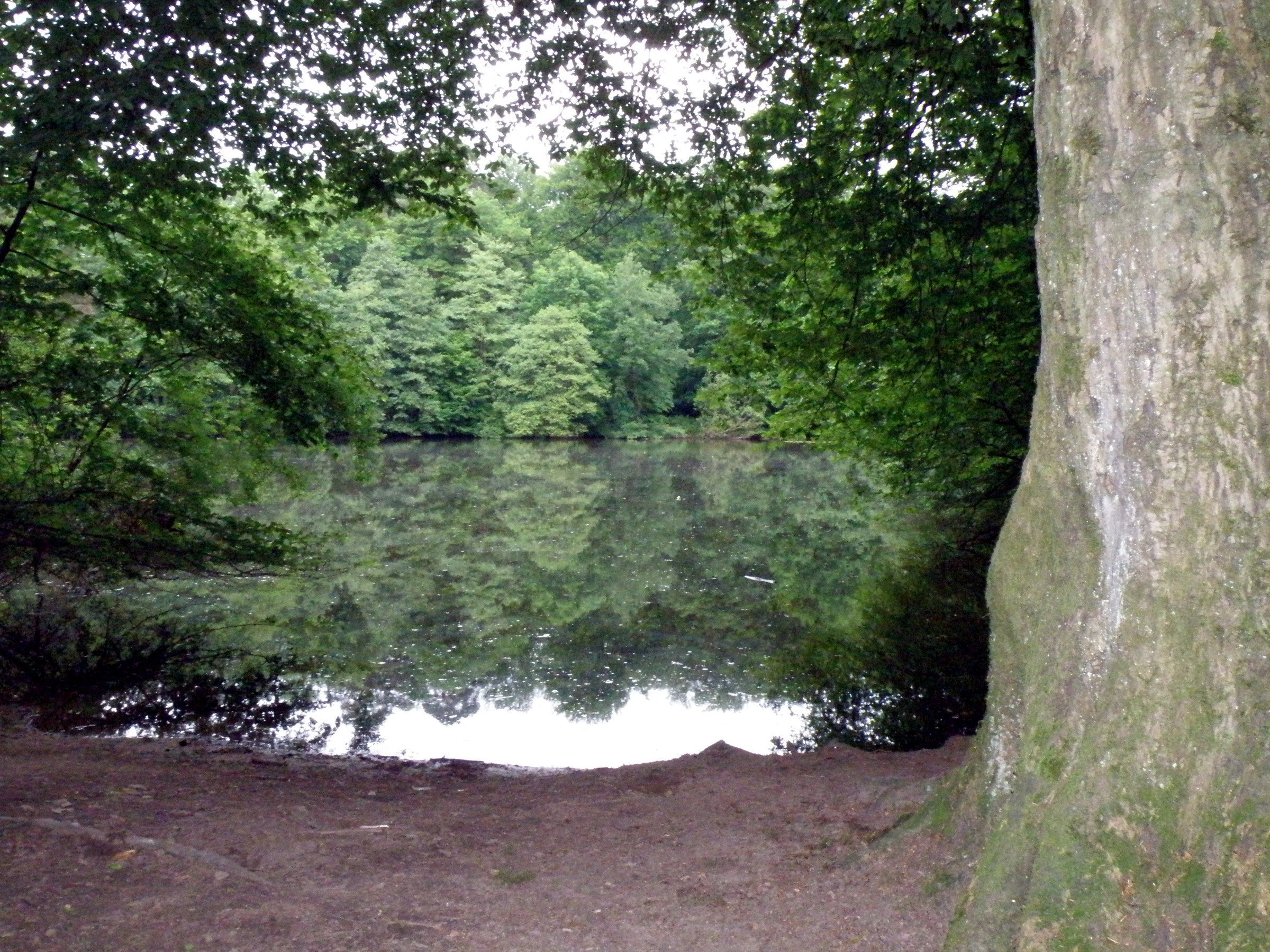 Kettners Weiher im Naturschutzgebiet „Königsforst“ (NSG GL-038), Ortsteil Bensberg der Stadt Bergisch Gladbach